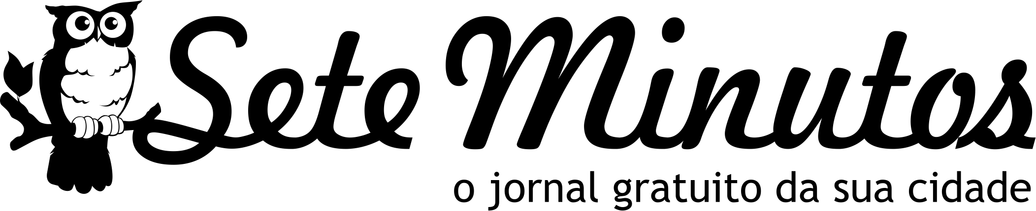 Logotipo utilizado de 23/06/2010 a 22/06/2017